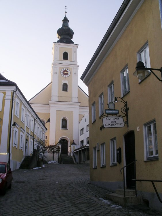 Kirchengasse in 84367 Tann